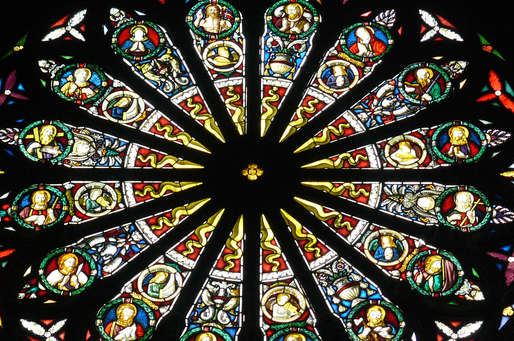 Monza, katedra, witraż.